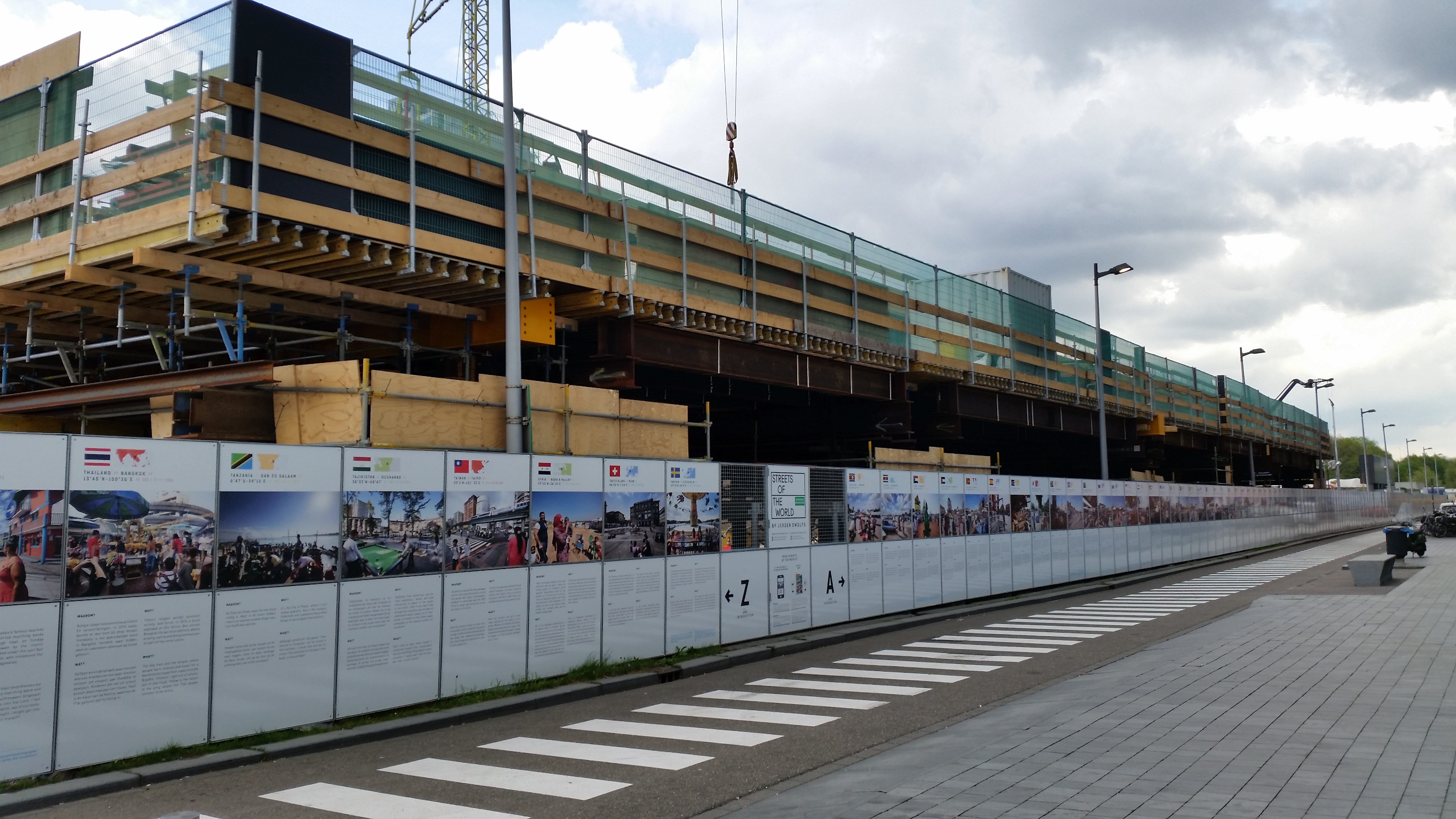 Wand van Streets of the world met daarboven uitstekend de Brittenpassage in aanbouw